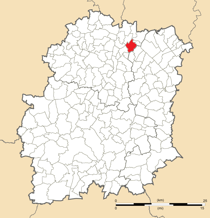 Carte de position de Savigny-sur-Orge en Essonne